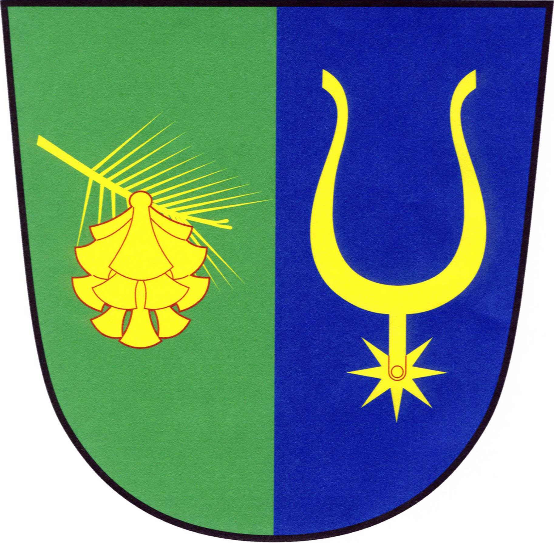 Znak obce Borek (okres Havlíčkův Brod)